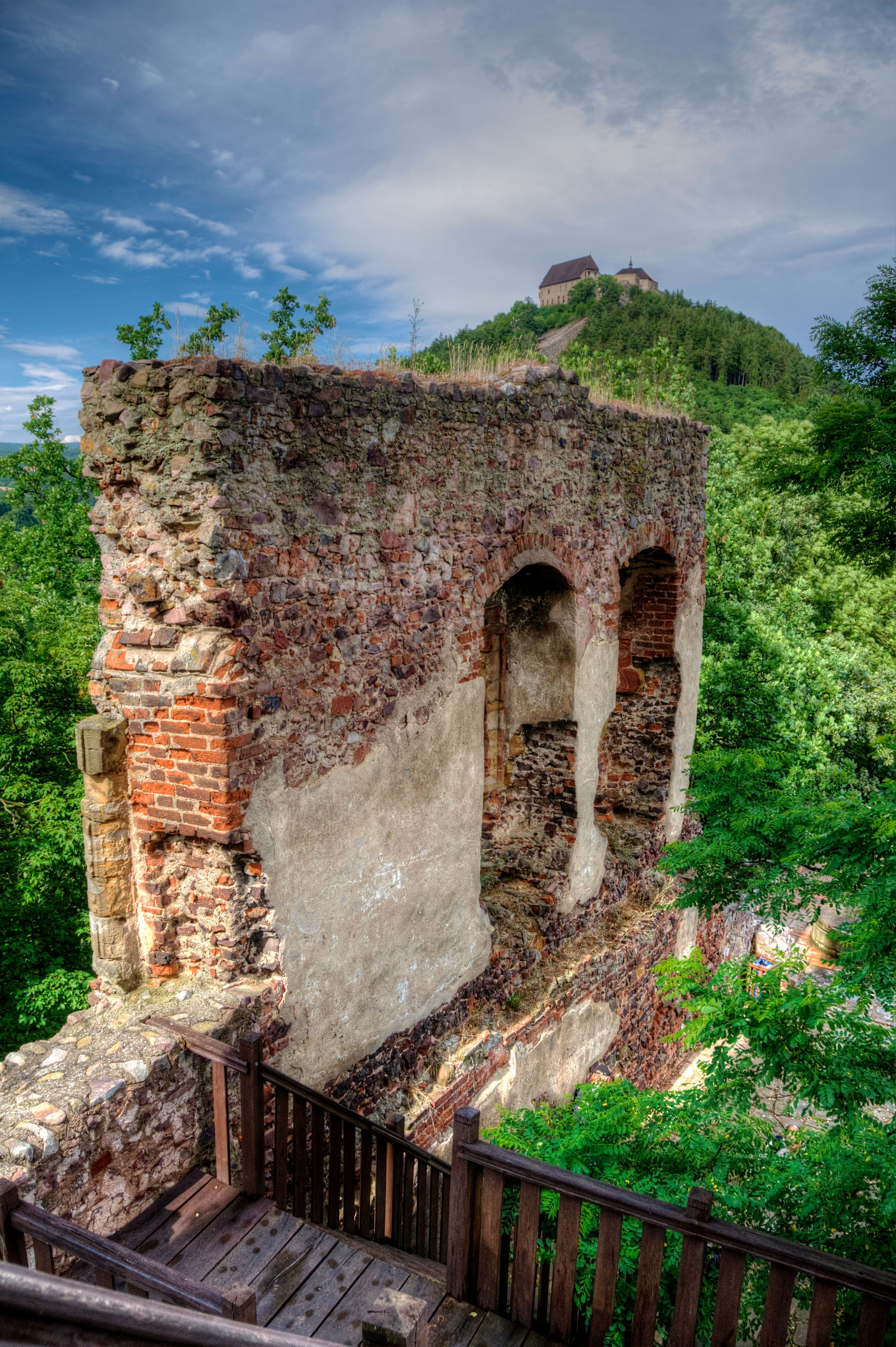 Zbytky severní stěny starého paláce, v pozadí Točník